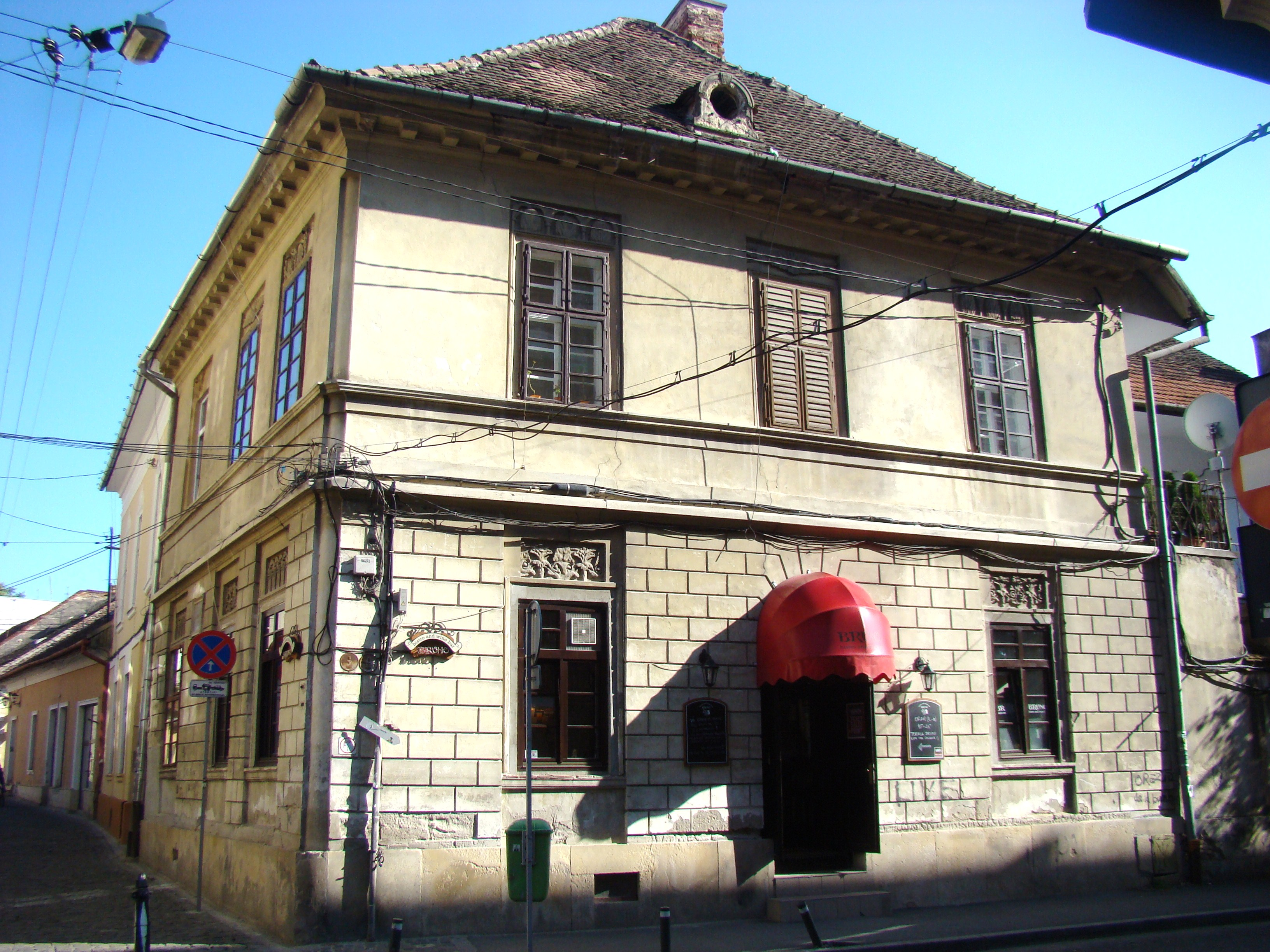 Casă monument, str.Daicoviciu, nr.1